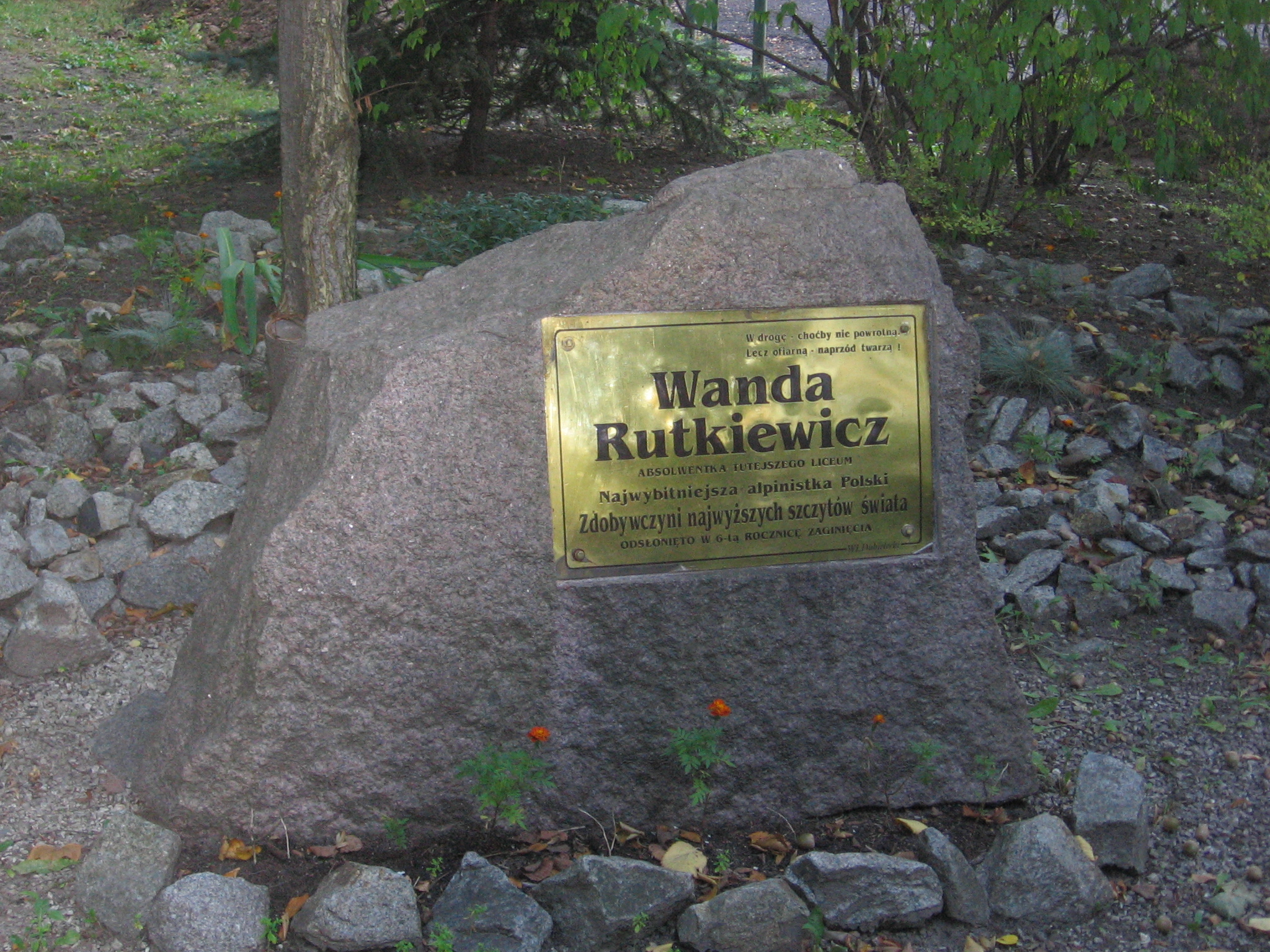 kamień z tablicą pamiątkową poświęconą Wandzie Rutkiewicz na terenie II Liceum Ogólnokształcącego we Wrocławiu